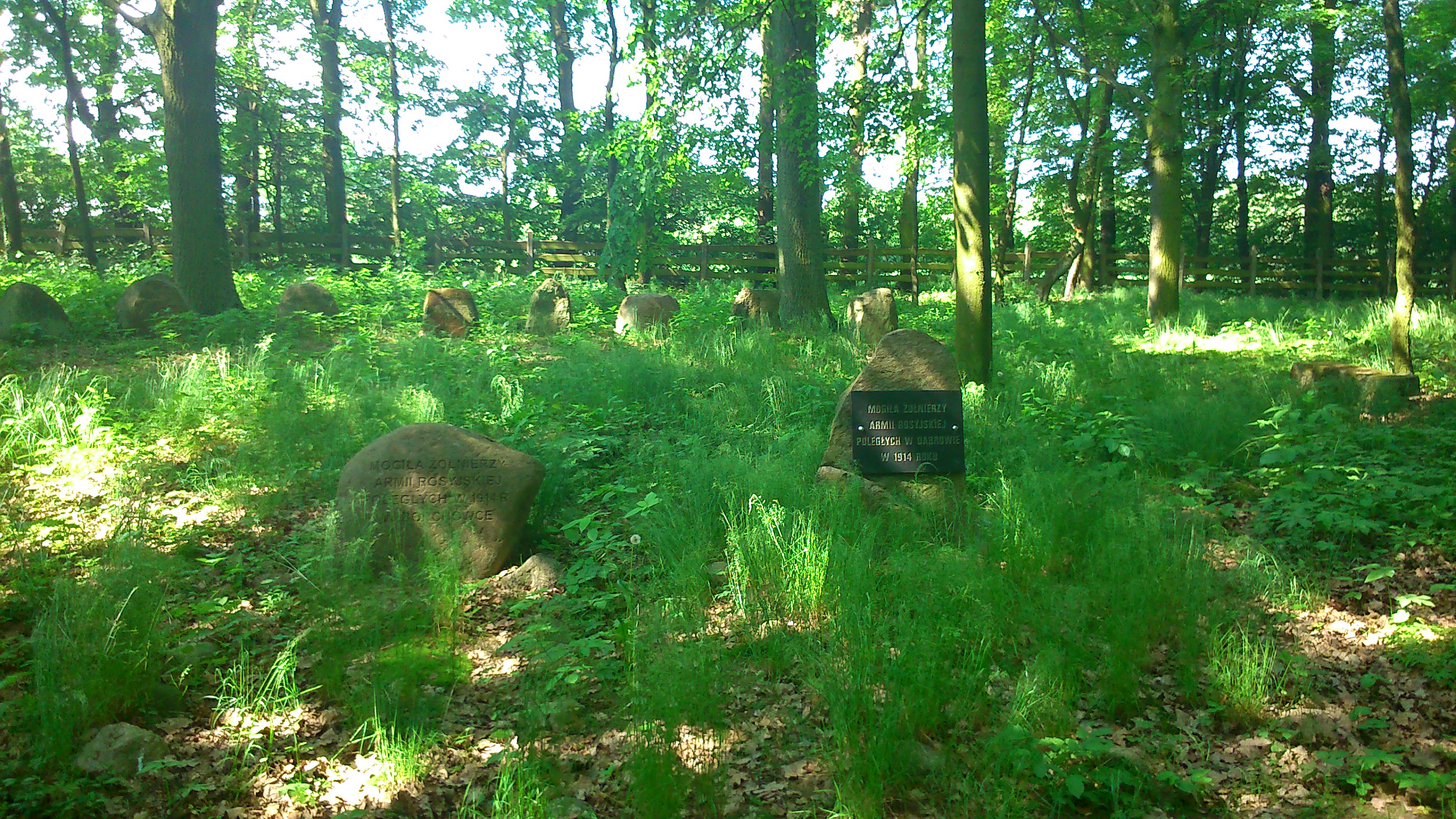 Kamienne kręgi żołnierzy rosyjskich, tzw. kwatery oficerskie.